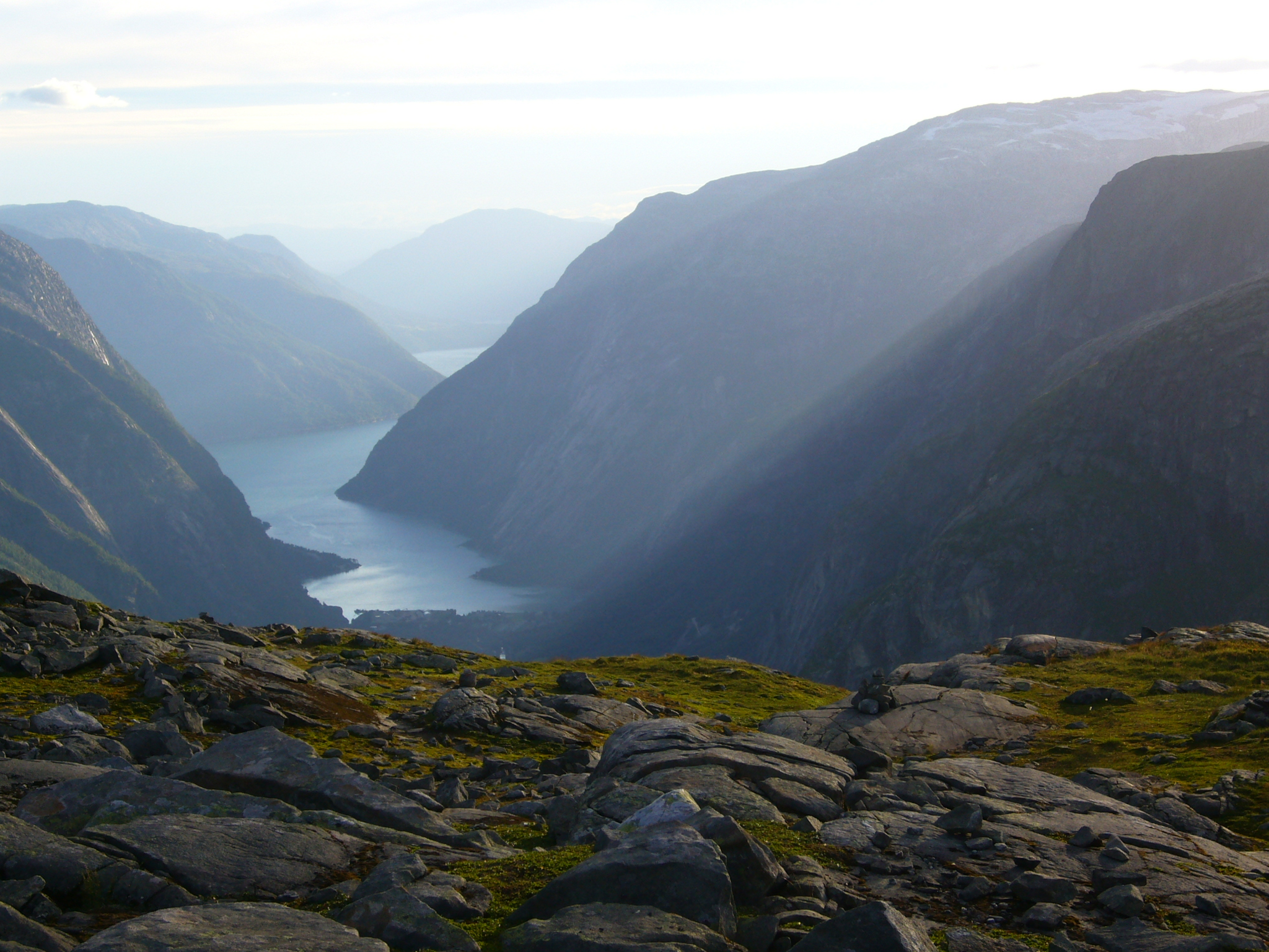 Fjord an der Hardangervidda